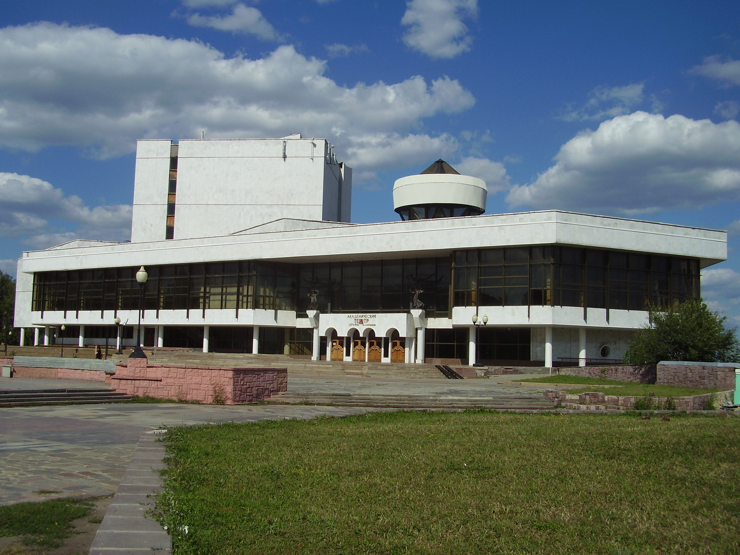 Воронежский драматический театр им. Кольцова